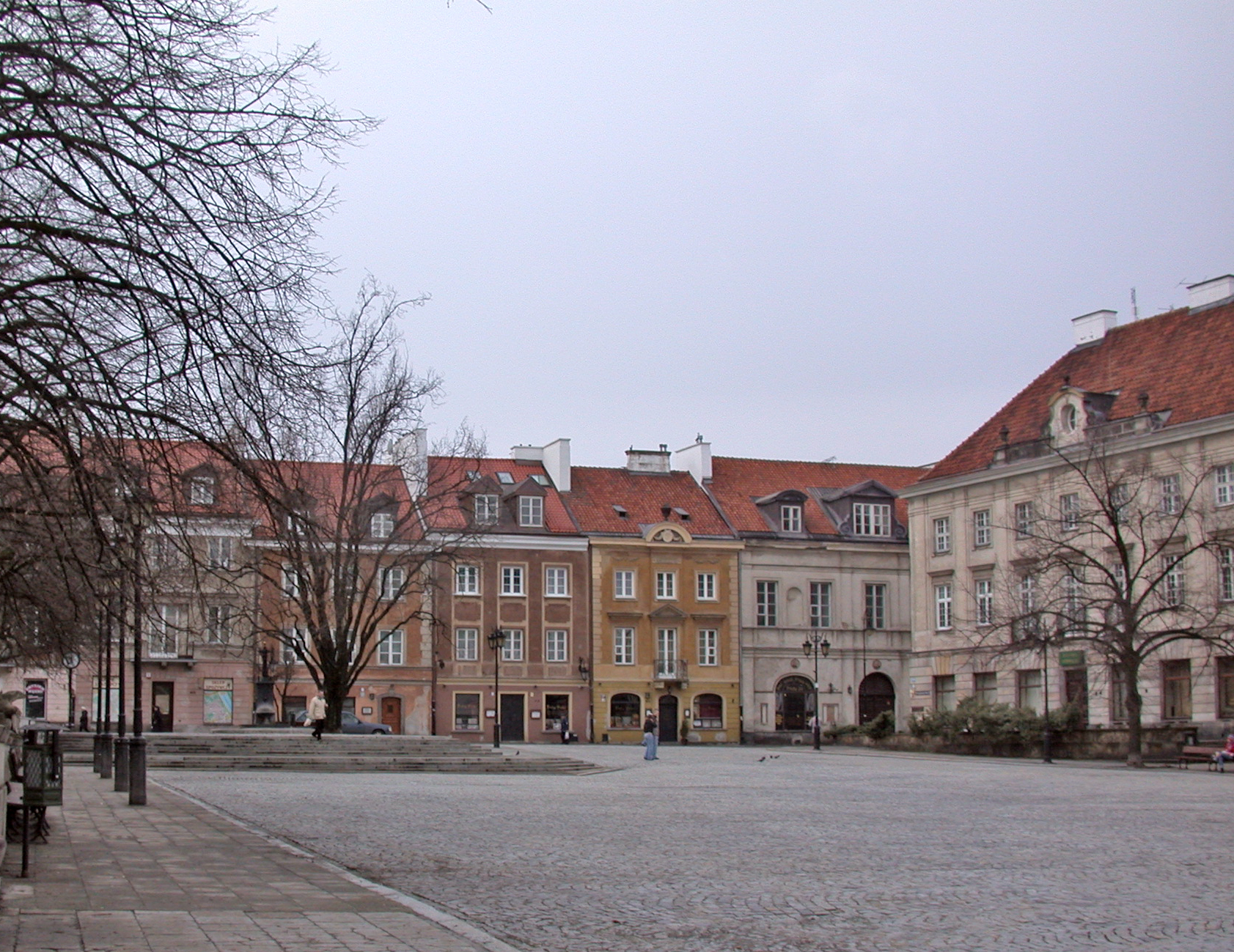 Varsavia, Piazza del Mercato della Città Nuova (Rynek Nowego Miasta), angolo nord-occidentale.